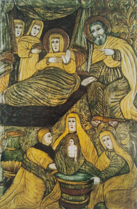 Абраз Нараджэння Багародзіцы. XVIII ст. З Маларыцкага р-на. МСБК НАН РБ